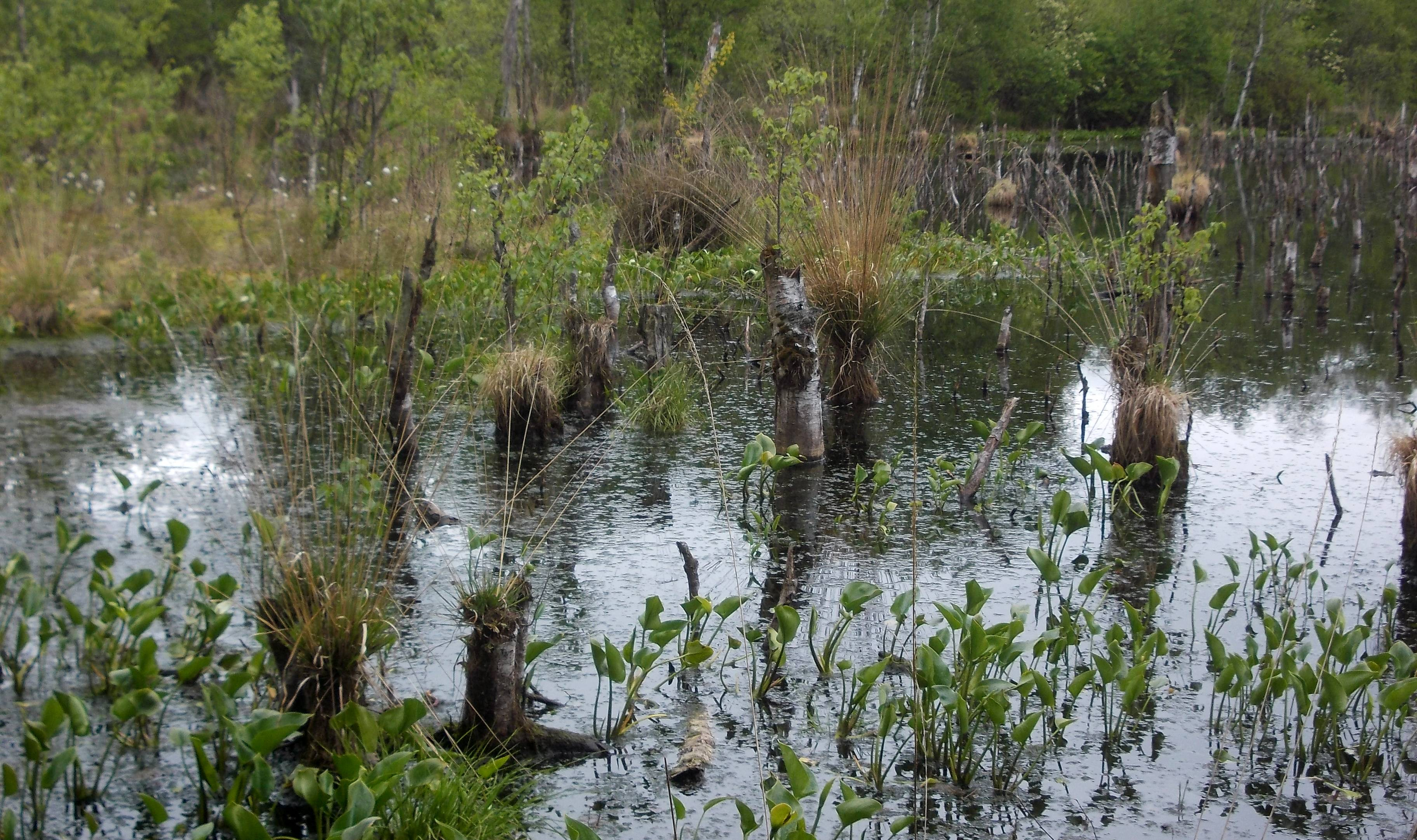 Vernässtes Königsmoor bei Hagen/Bremen